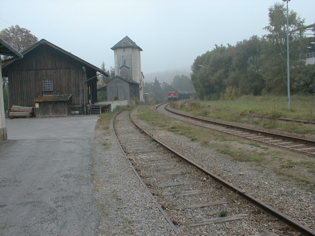 Die letzte offizielle Bedienung des Bahnhofes Raabs an der Thaya am 27.09.2000 (Kartoffeltransport).